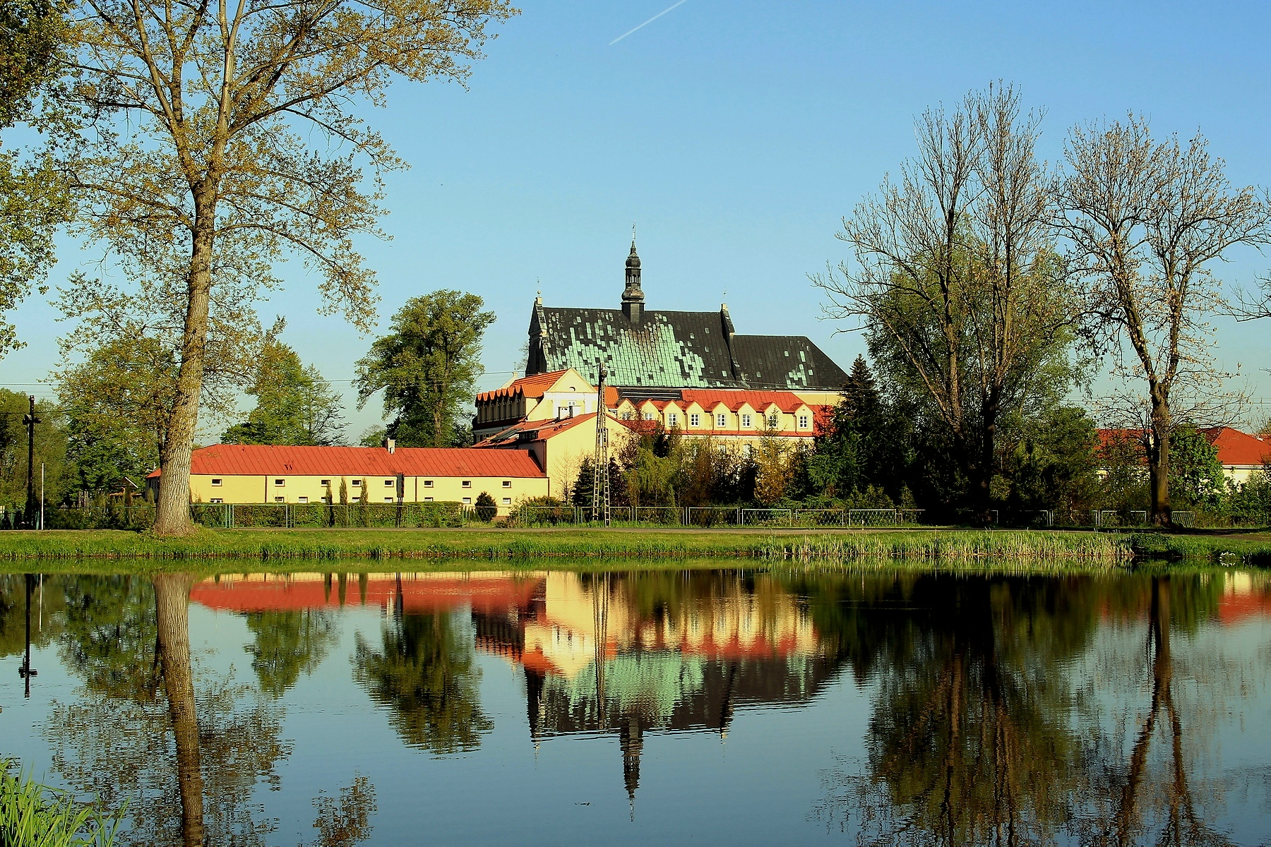 zespół klasztorny reformatów, ob. salezjanów, klasztor w Lutomiersku